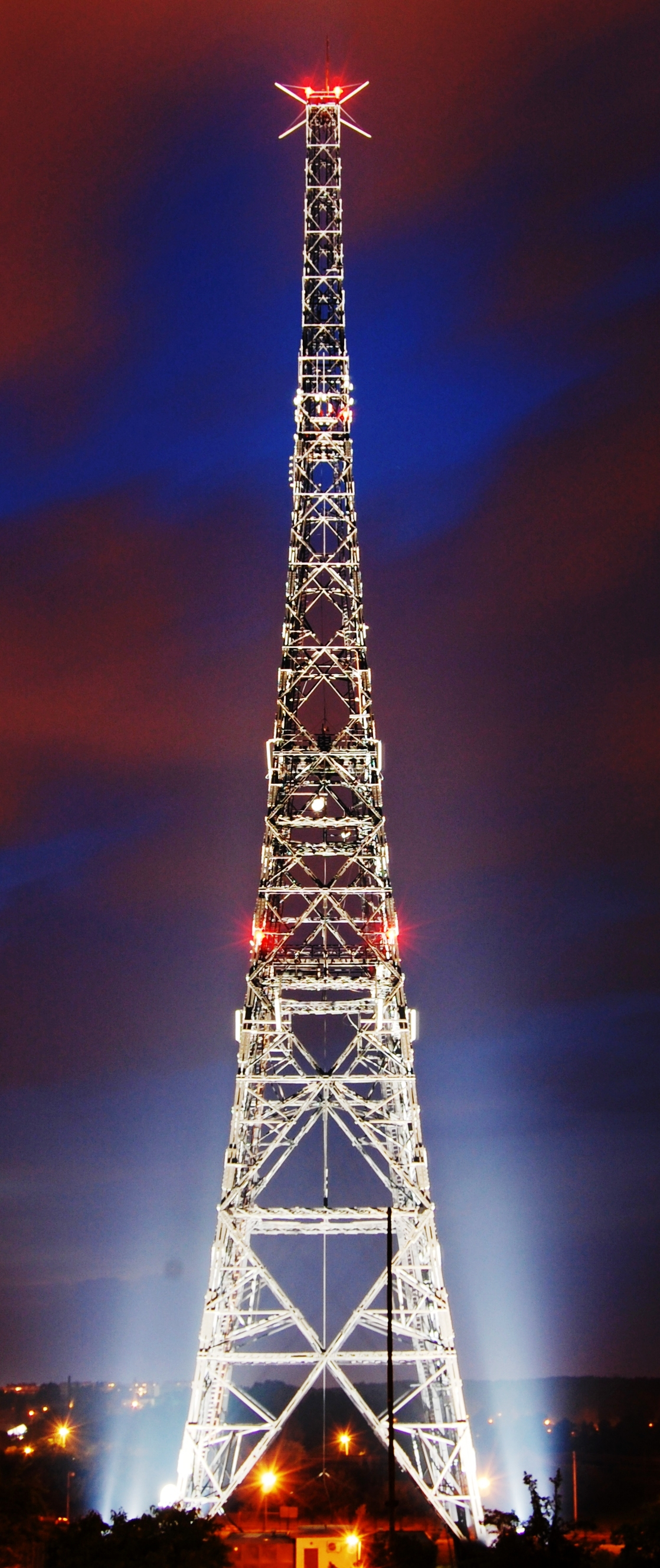 Gliwice -wieza radiostacji w nocy